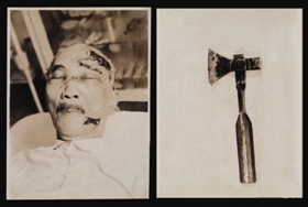 唐紹儀遇刺歷史圖片